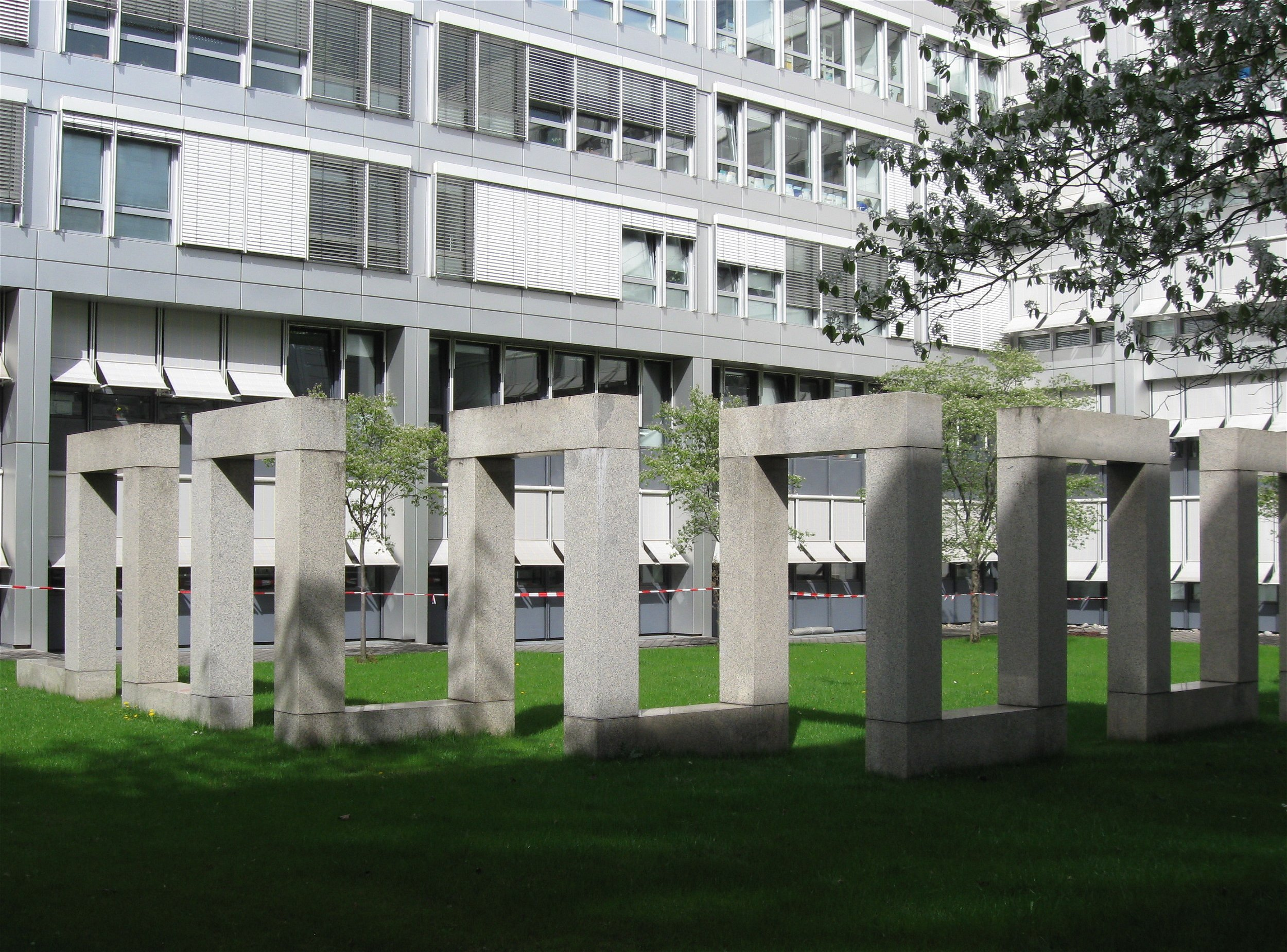 Max Bill: Rhythmus im Raum (1994), Europäisches Patentamt, Bayerstraße, München